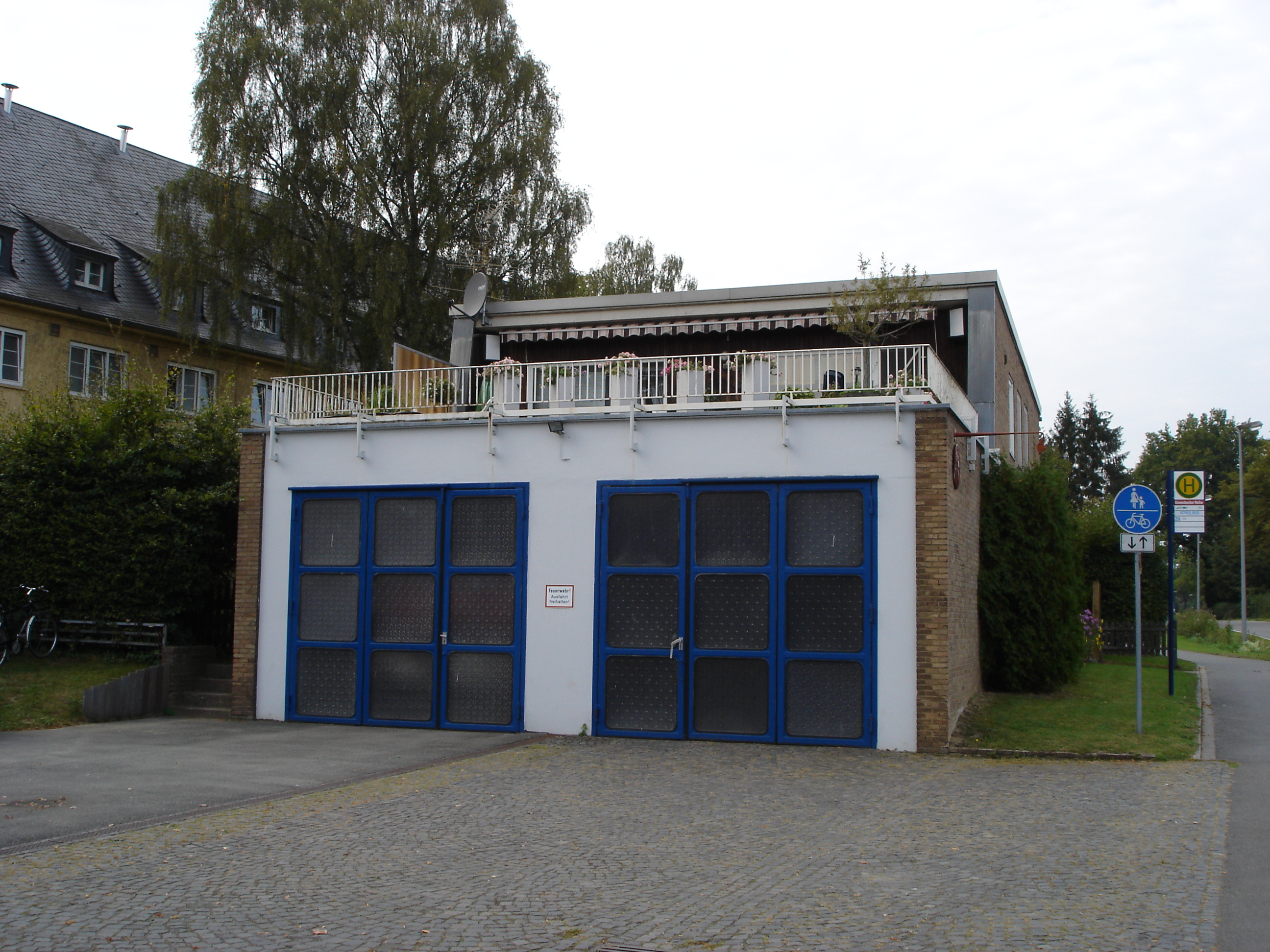 Ehemaliges Gerätehaus der Feuerwehr in Gievenbeck, Münster, Deutschland